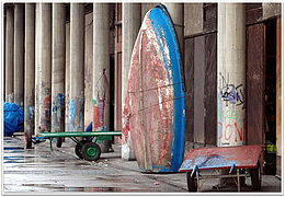 Antzina, Santurtzin "Bolintxeak" esaten zitzaion, bolintxei ez eze, arrantzaleen tresnak, sareak-eta gordetzeko tokiari ere. Hori guztia eraitsi, eta etxebizitzak eraiki zituzten haren lekuan. Gaur egun, beste toki bat dugu, portuan: bodegak.